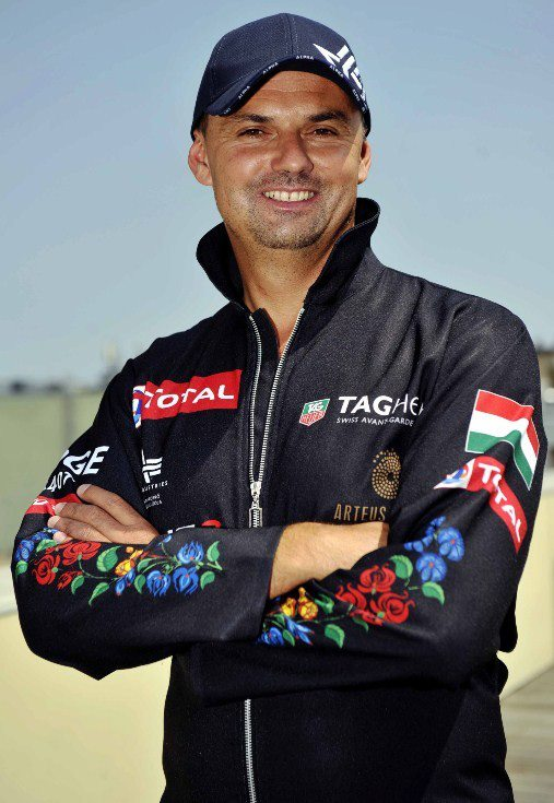 Nádas Tamás motoros műrepülő világbajnok (free)